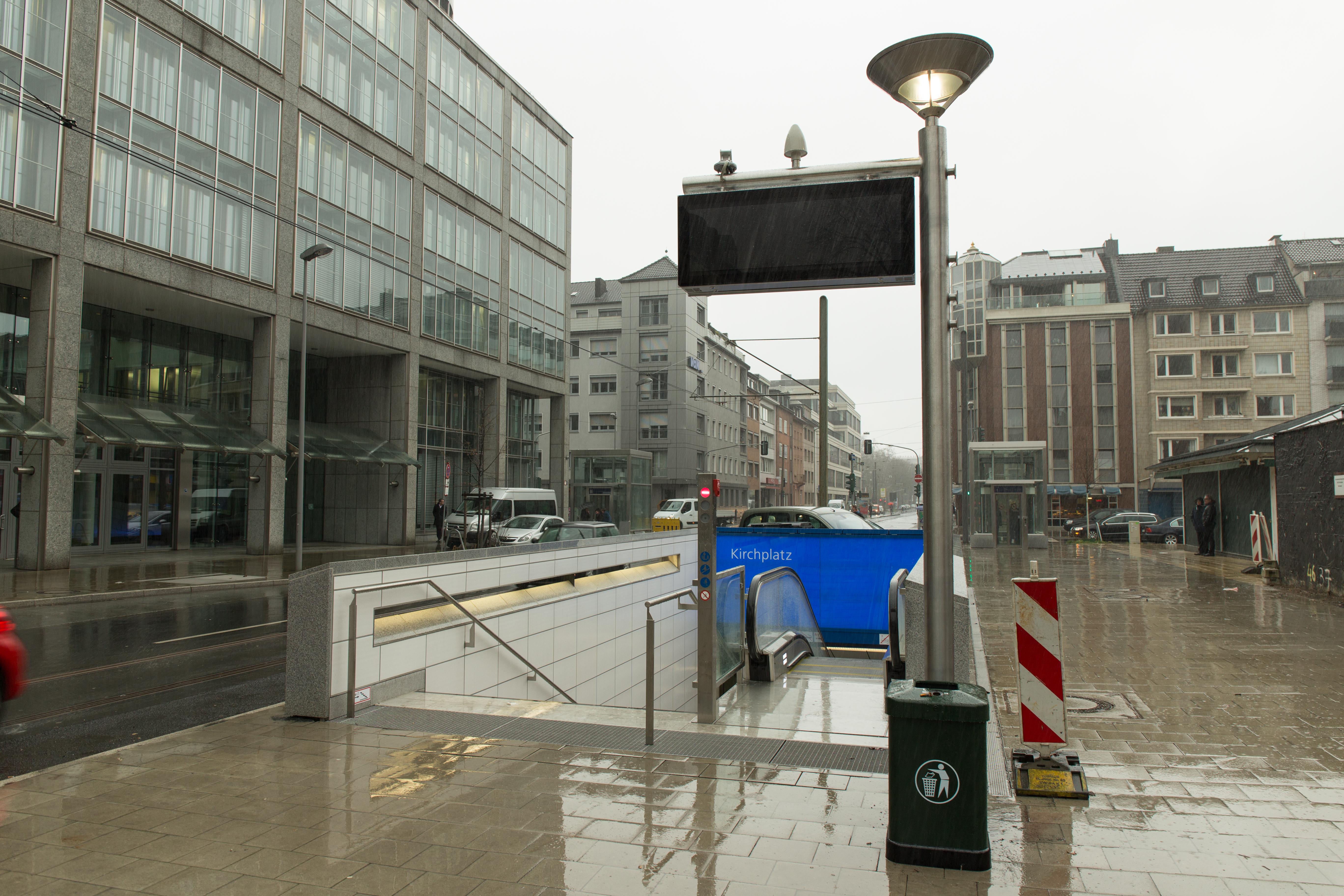 Wehrhahnlinie, Eingang U-Bahnhof Kirchplatz